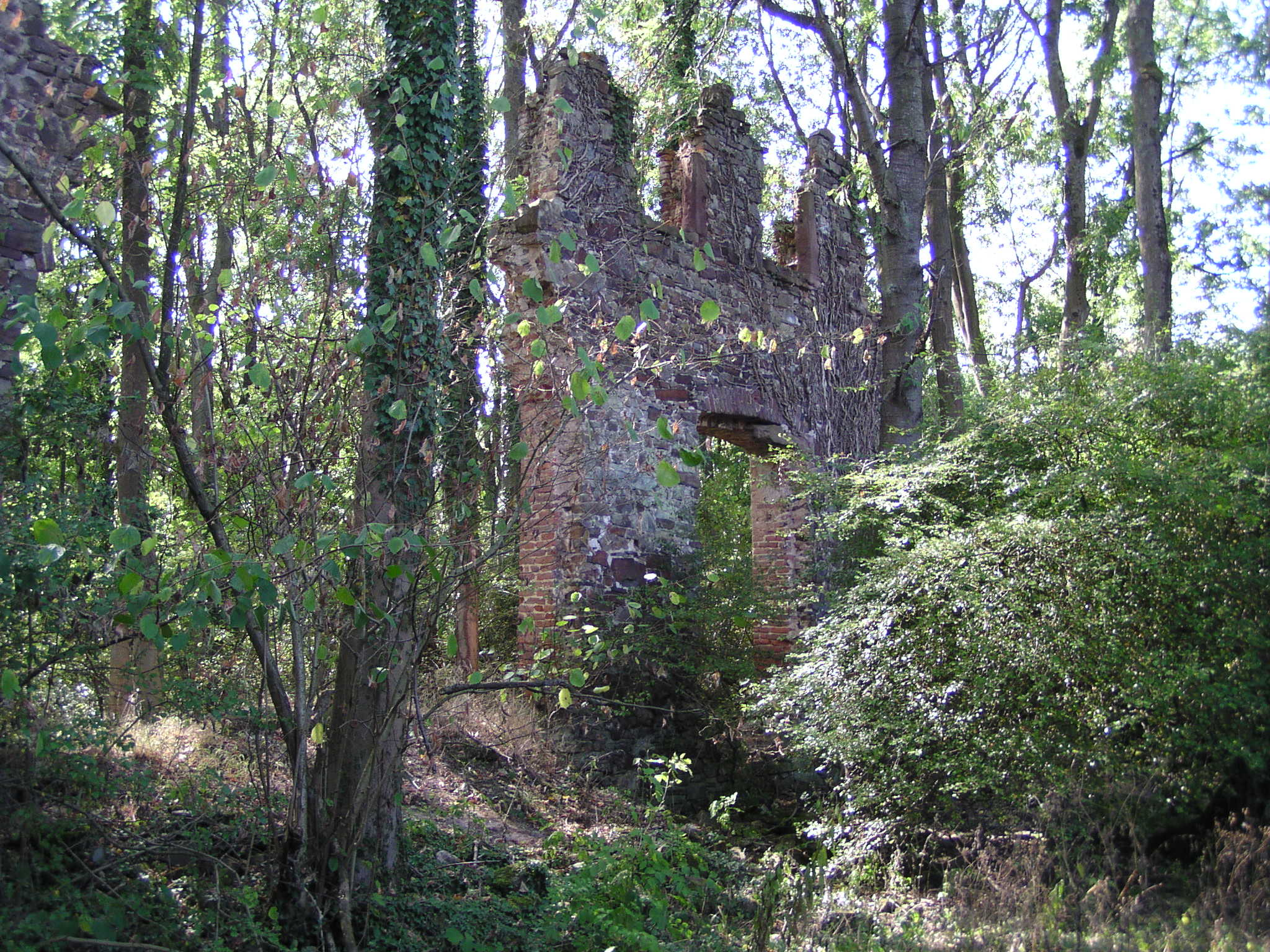 Mauerreste der Klosterruine Schwarzenbroich